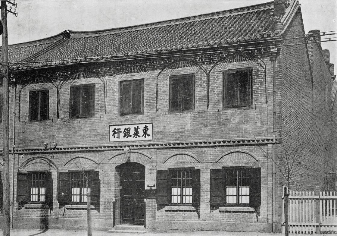 青岛东莱银行早期行址